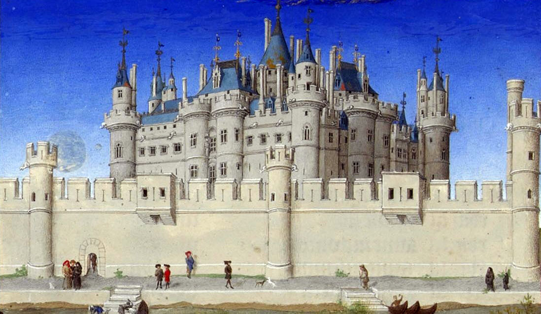 Louvre dans Les Très Riches Heures